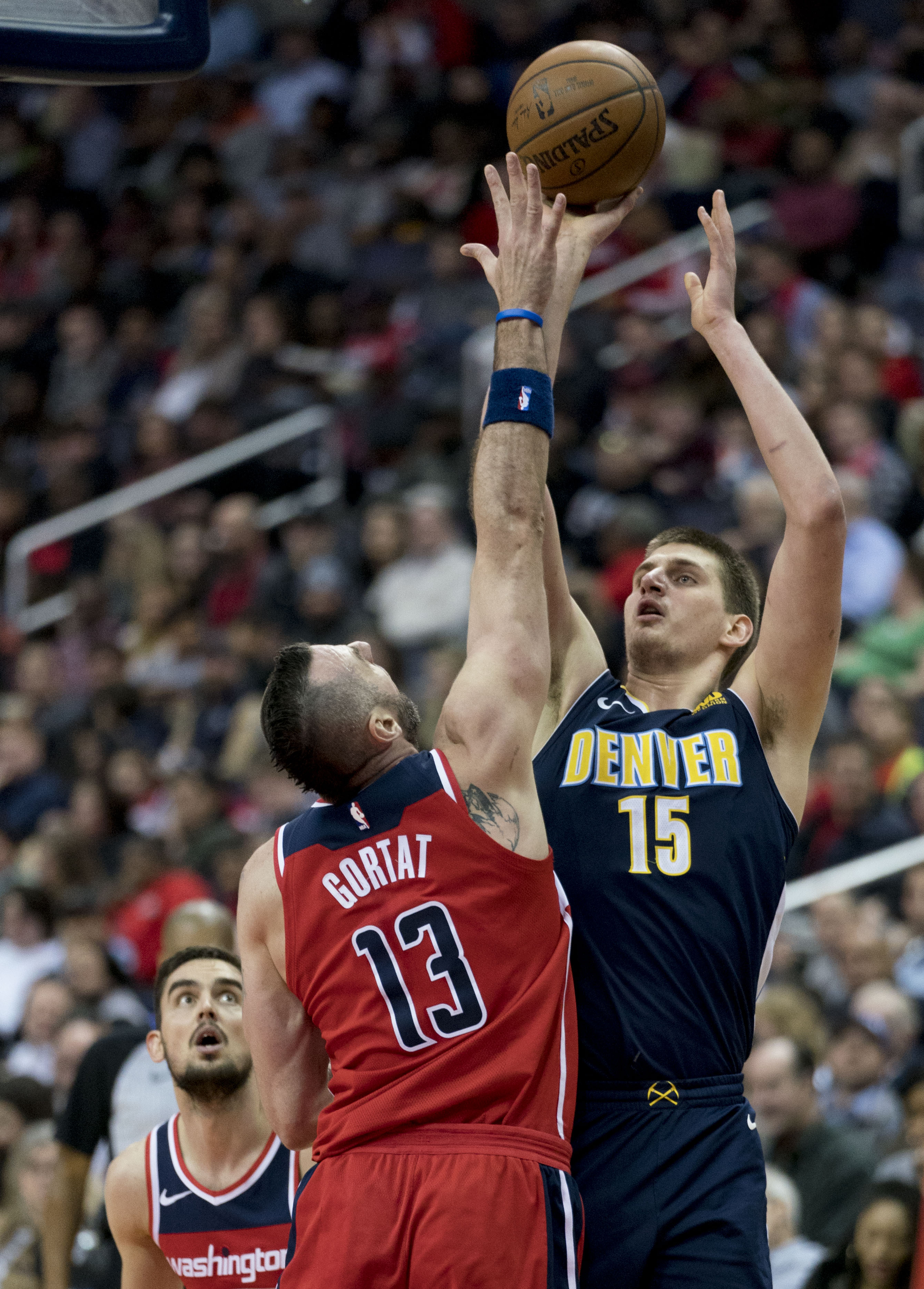 Nuggets at Wizards 3/23/18